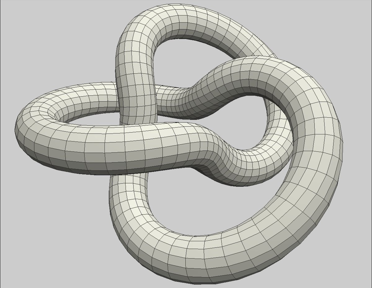 Nudo de tres hojas